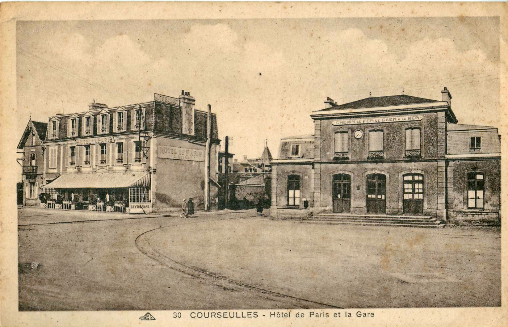 Carte postale ancienne éditée par CAP, n°30 :COURSEUILLES - Hôtel de Paris et la Gare